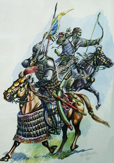 Қидандар